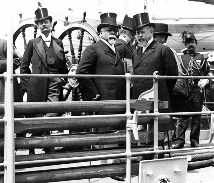 Visita de Campos Sales à Argentina em 1900, sendo recebido pelo presidente Julio Roca